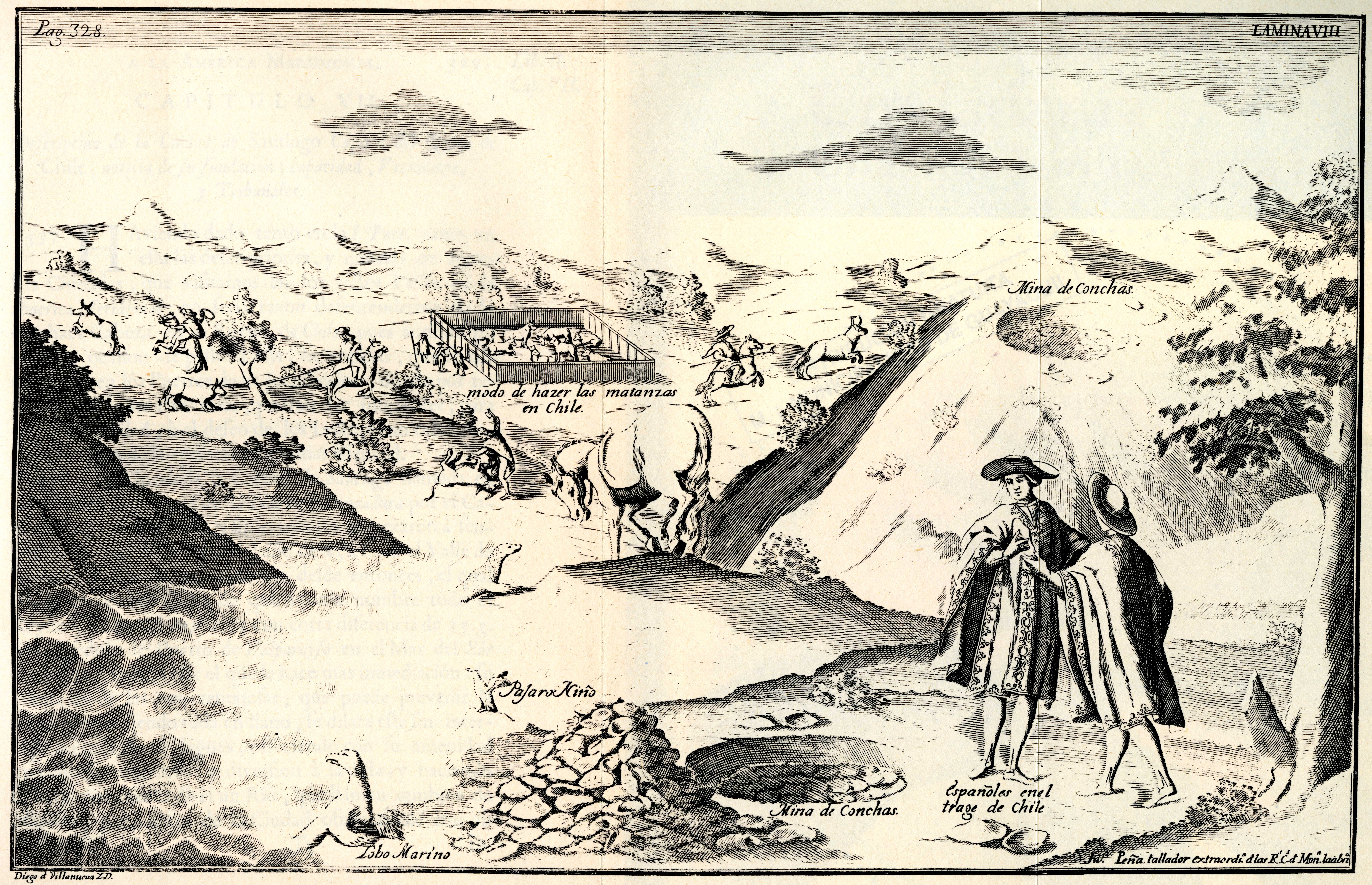 De Ulloa, Antonio y Jorge Juan. Relación Histórica del Viaje a la América Meridional, hecho de Orden de Su Majestad Católica para medir algunos Grados de Meridiano Terrestre, y venir por ellos en conocimiento de la verdadera Figura y Magnitud de la Tierra, con otras varias Observaciones Astronómicas y Físicas. Por Don Jorge Juan Comendador de Aliaga, en la Orden de San Juan, Socio correspondiente de la Real Academia de las Ciencias de París y Don Antonio de Ulloa de la Real Sociedad de Londres: ambos Capitanes de Fragata de la Real Armada. Segunda Parte / Tomo II. Impresa por la Orden del Rey Nuestro Señor en Madrid por Antonio Marín, Año de MCDDXLVIII (1748). Diapositiva de Consulta y acceso publico cuya información fue investigada de un libro y/o ejemplar de revisión custodiado en los Fondos Bibliográficos (Sección Siglo XVIII o Etapa Colonial) del Archivo Histórico del Guayas; Guayaquil, Ecuador